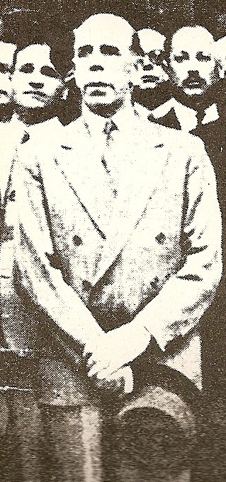 Edelmiro Farrel en ocasión de la asunción de Perón como Director del Departamento de Trabajo.